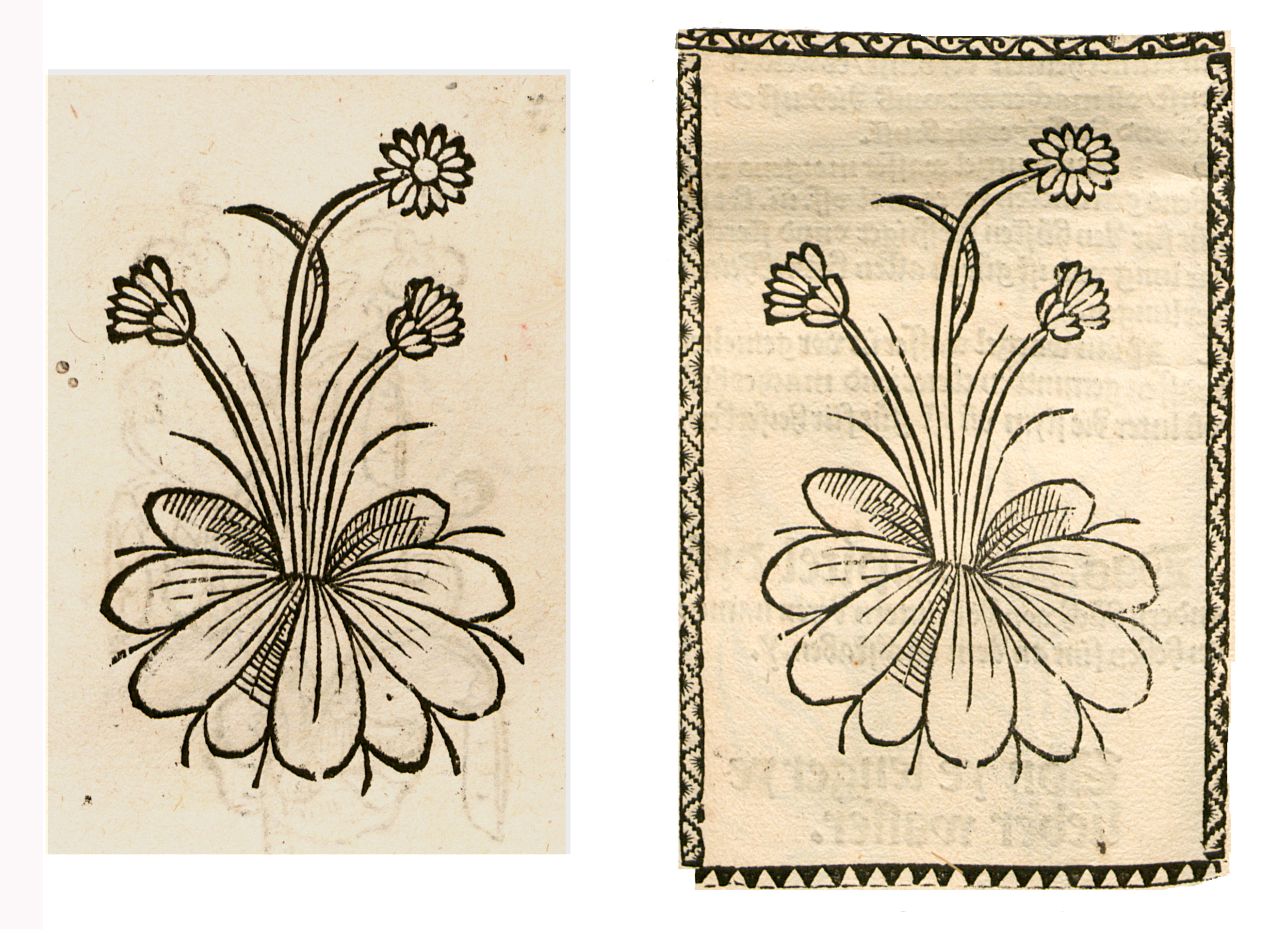 Abbildung von: Zytlosen Krut (Bellis perennis)